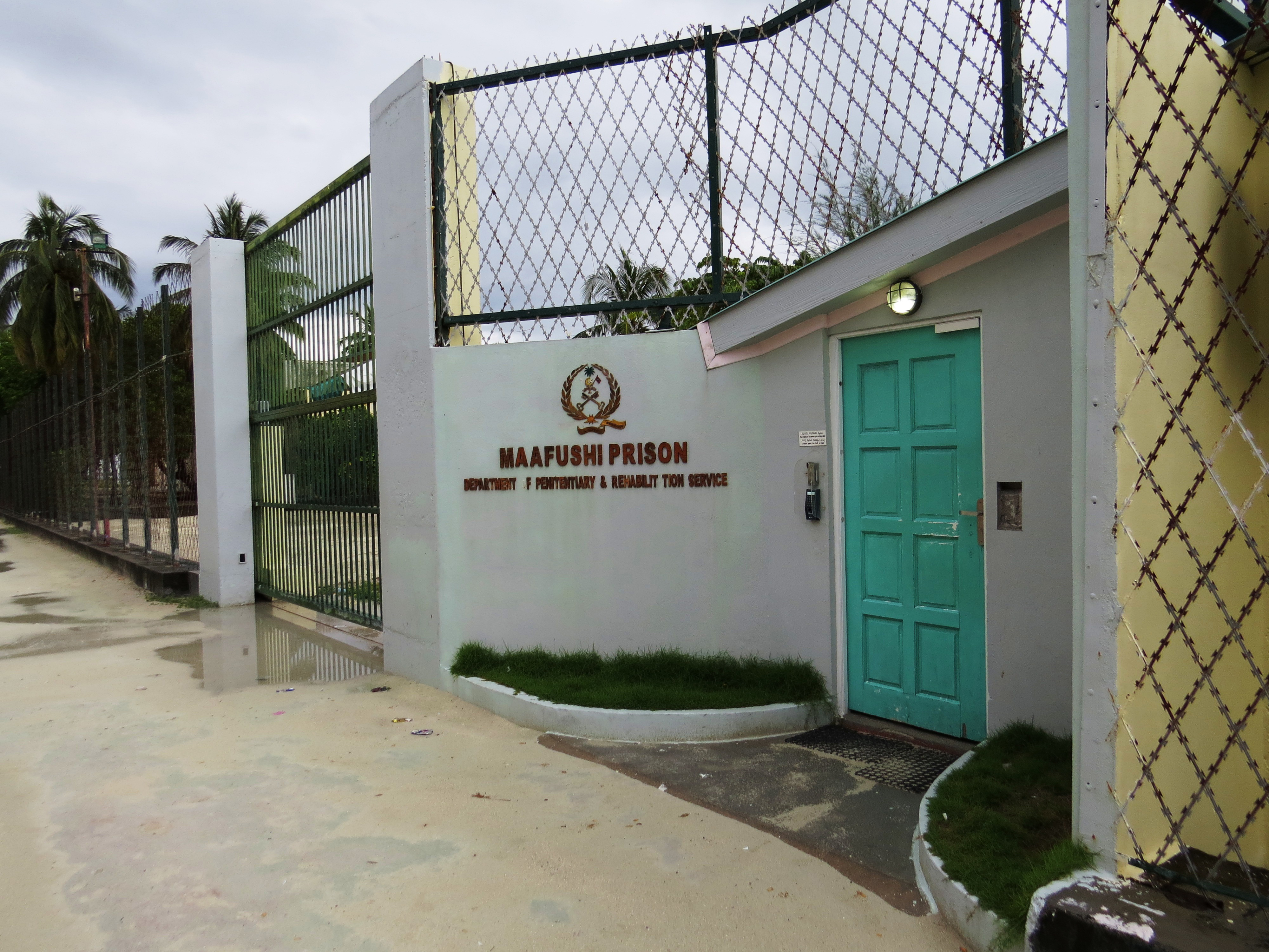 Maafushi Prison